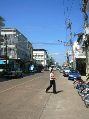 Sakon Nakhon, Thailand - Straßenszene Aufnahmedatum: November 2004